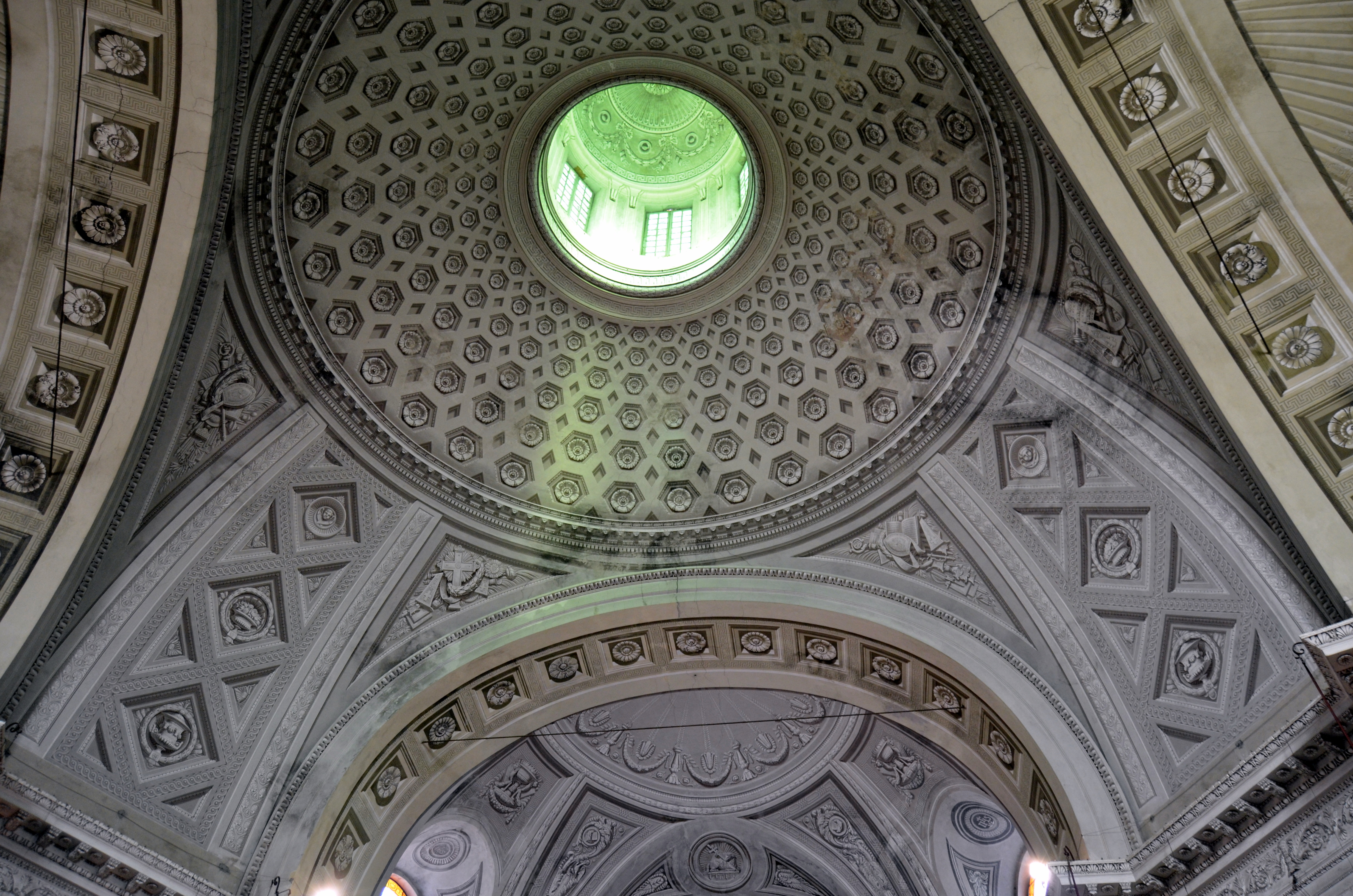 La collegiata di San Giovanni Battista, Pieve di Teco, Liguria, Italia